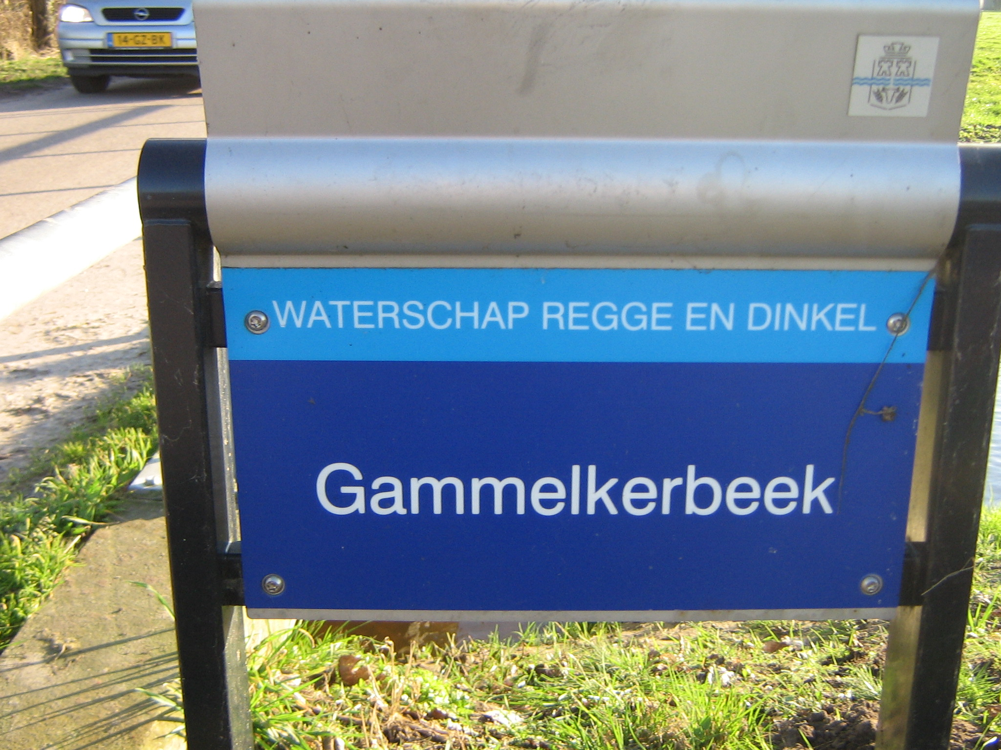 Zelfgemaakte foto Licensing